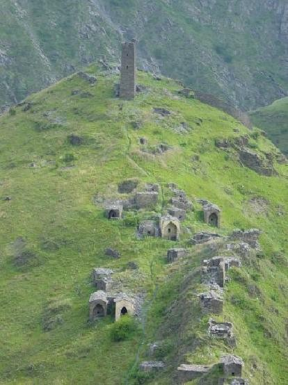 Нохчийн: Tsoy-Peda